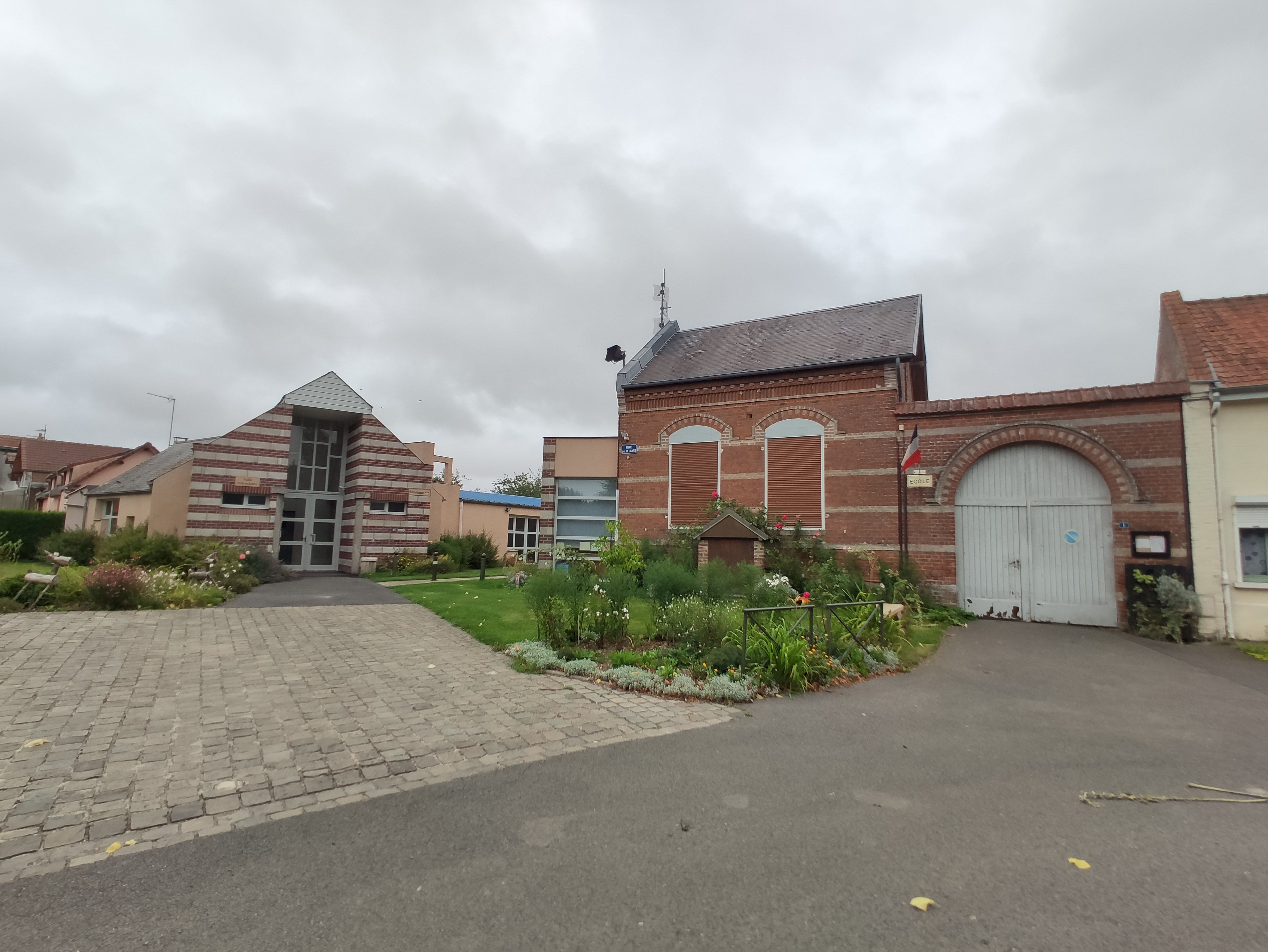 Pissy (Somme) : Ecole et salle communale